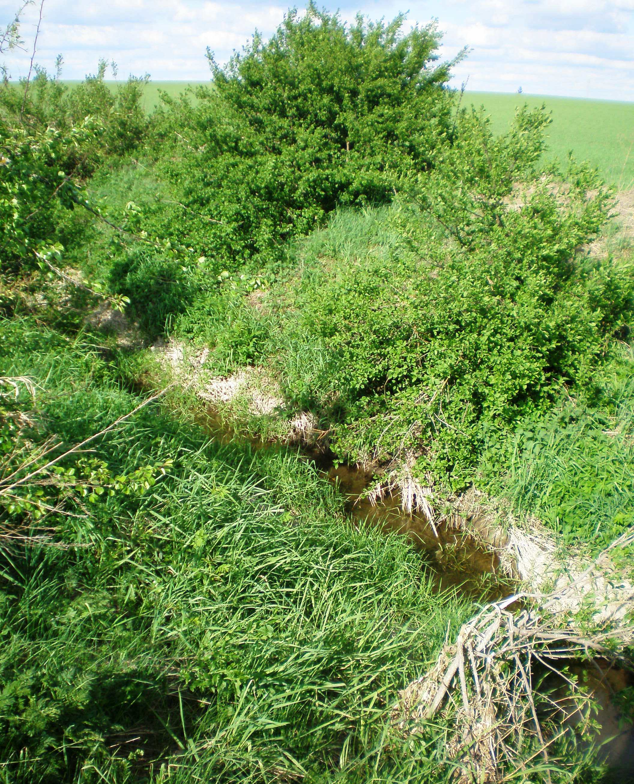 Kruosto upelis ties Beržele, Kėdainių raj.